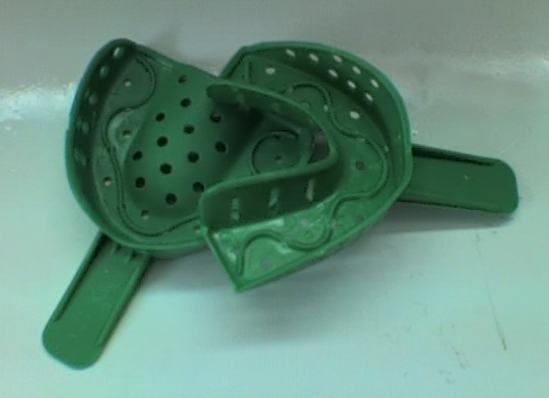 Cubetas estandar de plástico superior e inferior